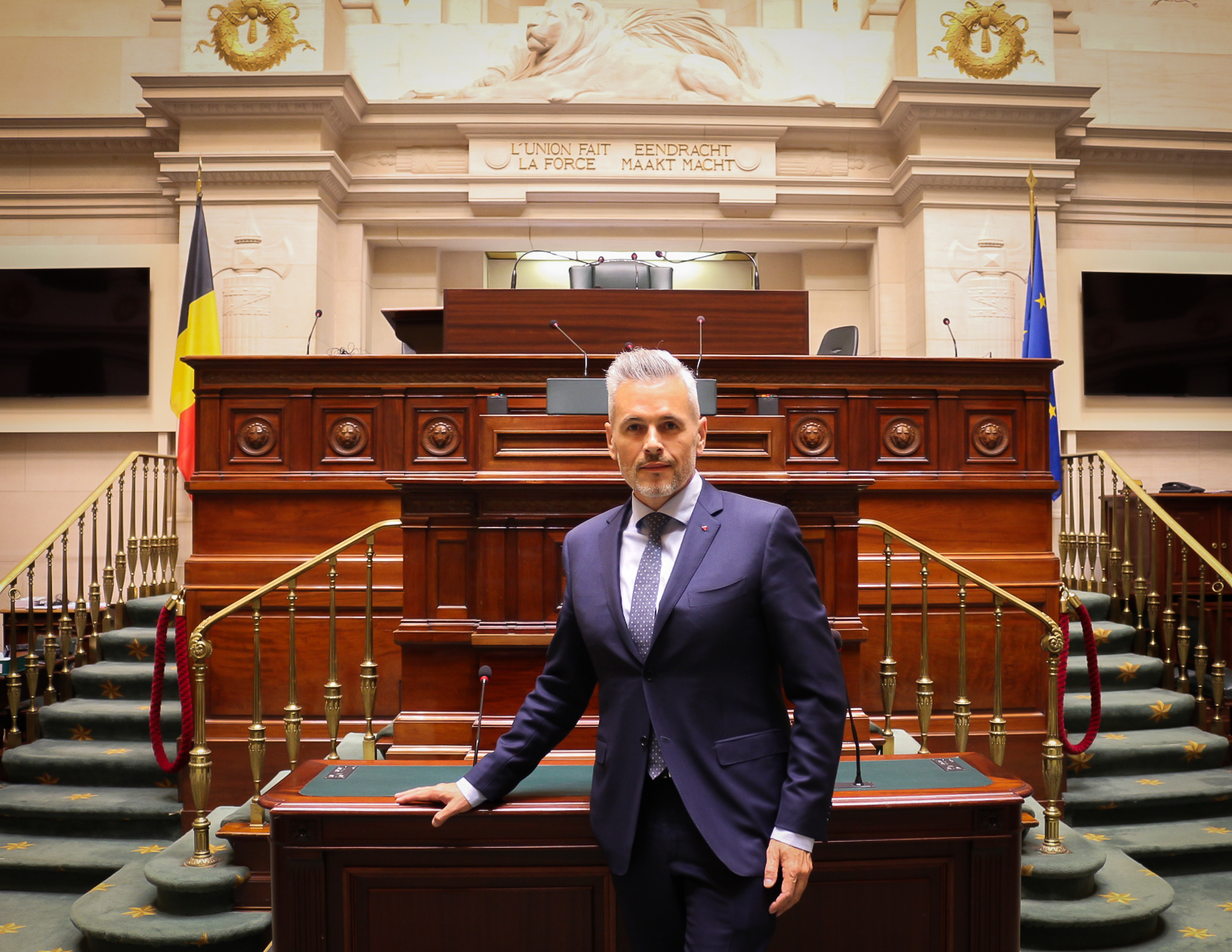 Prestation de serment Christophe Lacroix